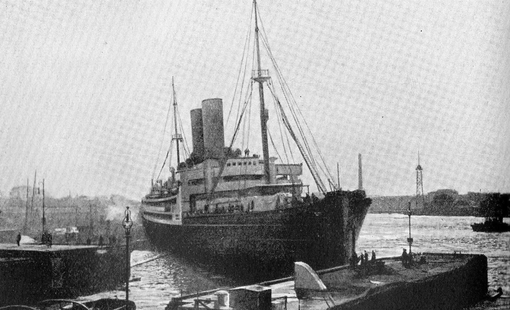 Hilfskreuzer BERLIN. Aufnahmeort und -zeit unbekannt